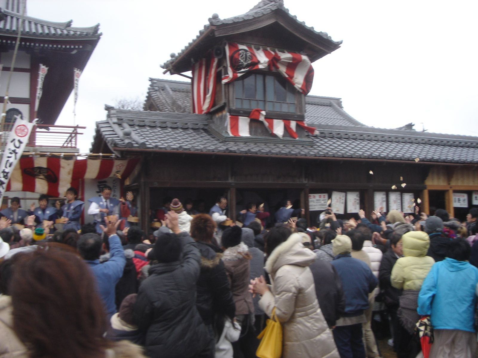 Houkouin Setsubun-e （宝光院 (大垣市)の節分会,豆打ち式）,Ogaki,Gifu,Japan(岐阜県大垣市)で撮影。